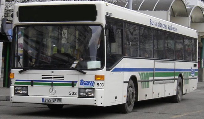 Mercedes-Benz O 405 TRAM